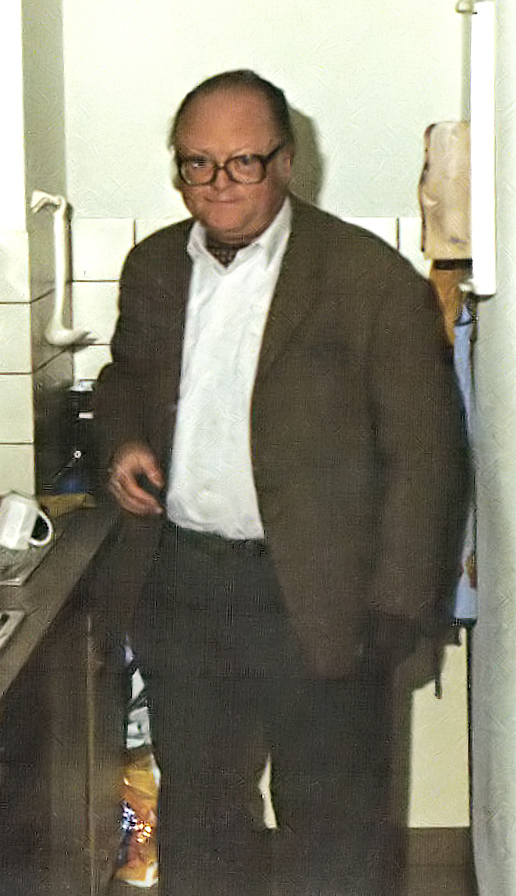 Karl-Josef Freiherr von Ketteler in der Küche des Fotographen in Altenkirchen/Ww, Birkenweg 12